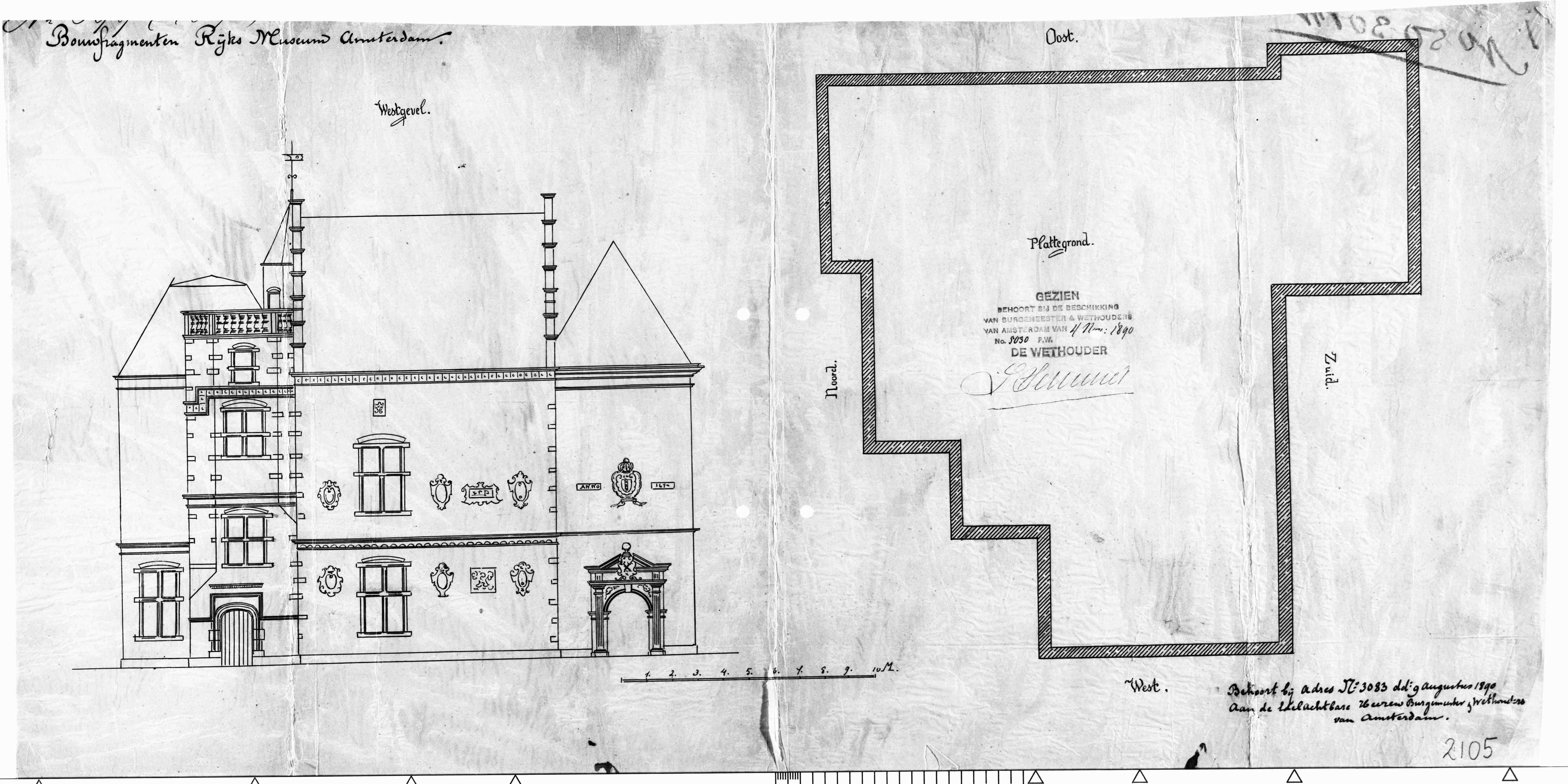 Bouwen van een perceel op het Rijksmuseumterrein. opstand westgevel en plattegrond